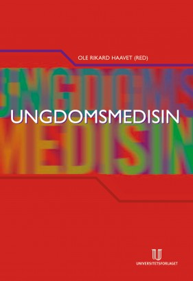 Den første norske fagboka i ungdomsmedisin